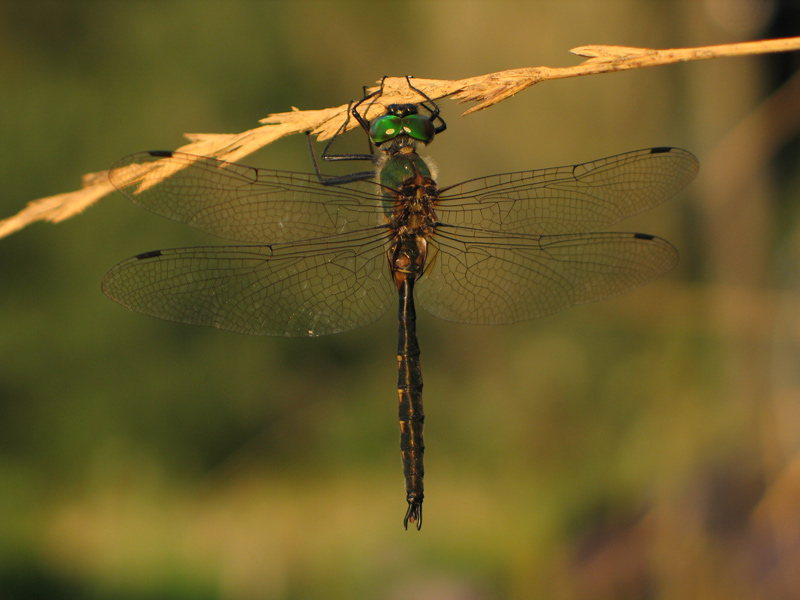 Ein Männchen der Gefleckten Smaragdlibelle (Somatochlora flavomaculata) beim Sonne tanken.